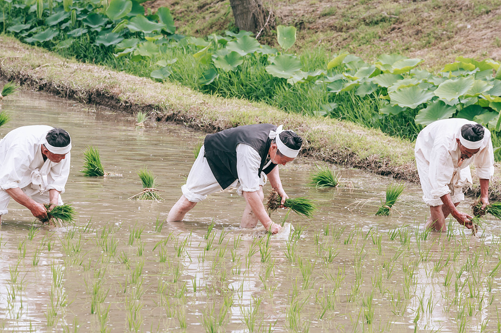 증평 모내기의 모습이며 장뜰두레농요를 부르고 있다.